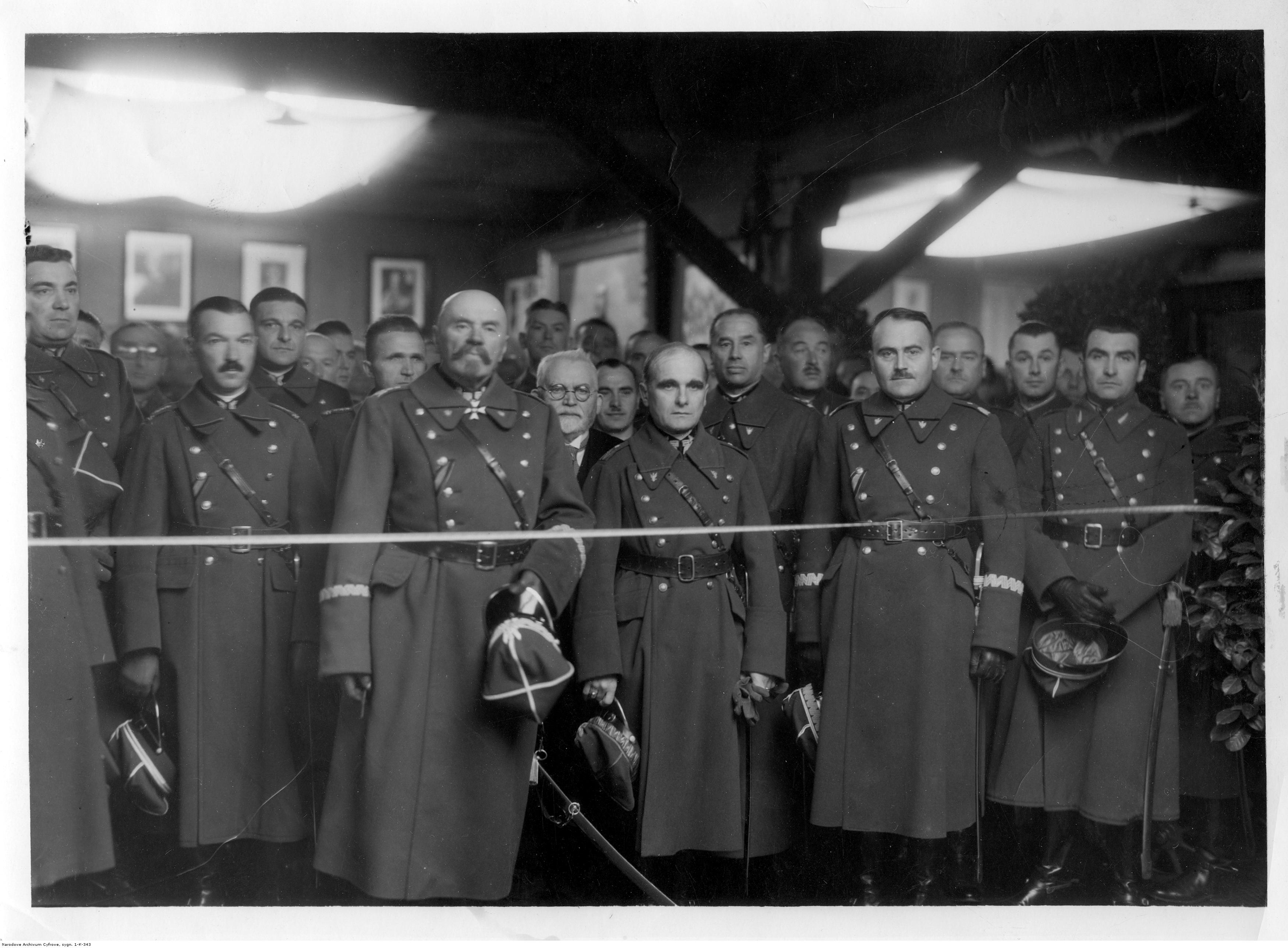 Wielkopolskie Muzeum Wojskowe w Poznaniu. Otwarcie działu 55 pp, dawnego 1 pułku strzelców wielkopolskich. Uczestnicy uroczystości: gen. Daniel Konarzewski, gen. Franciszek Wład, gen. Sergiusz Zahorski, płk Franciszek Alter, płk Marian Chilewski, płk Michał Gałązka, dyr. muzeum art. rzeźbiarz Władysław Marcinkowski i inni. Koncern Ilustrowany Kurier Codzienny - Archiwum Ilustracji. Sygnatura: 1-K-343